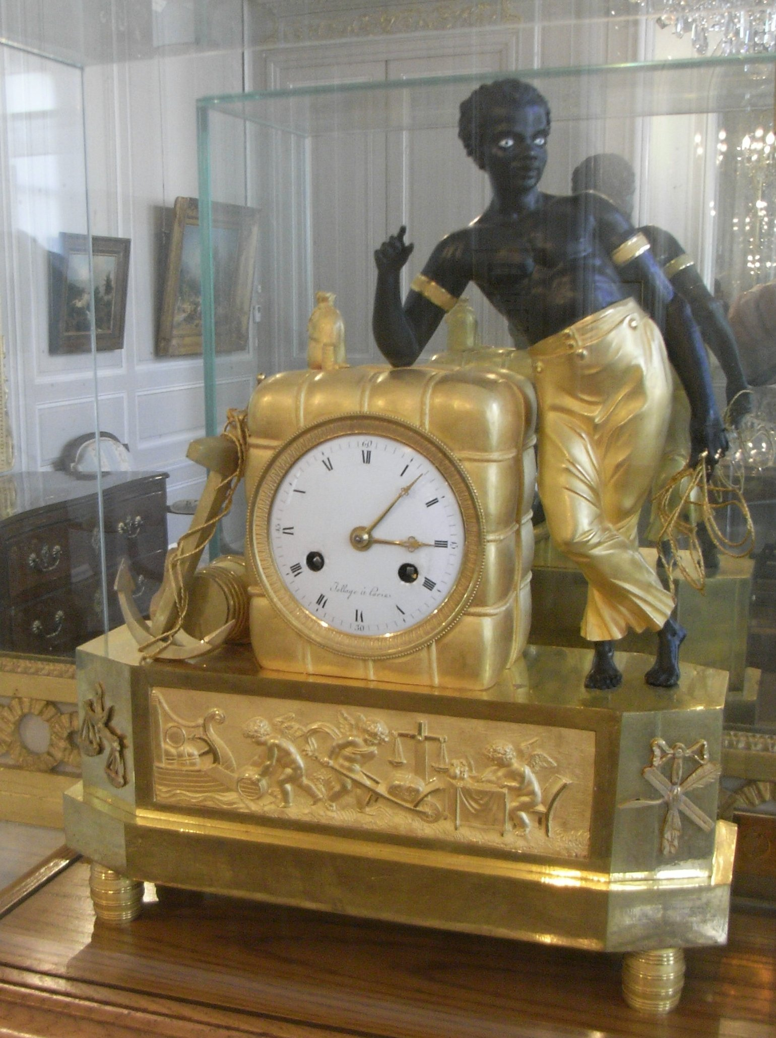 Pendule en bronze (c. 1808), signé Jollage à Paris, patiné et doré représentant un jeune noir participant au chargement d'une balle de coton dans un navire, au Musée du Nouveau Monde à La Rochelle (Charente-Maritime - France).